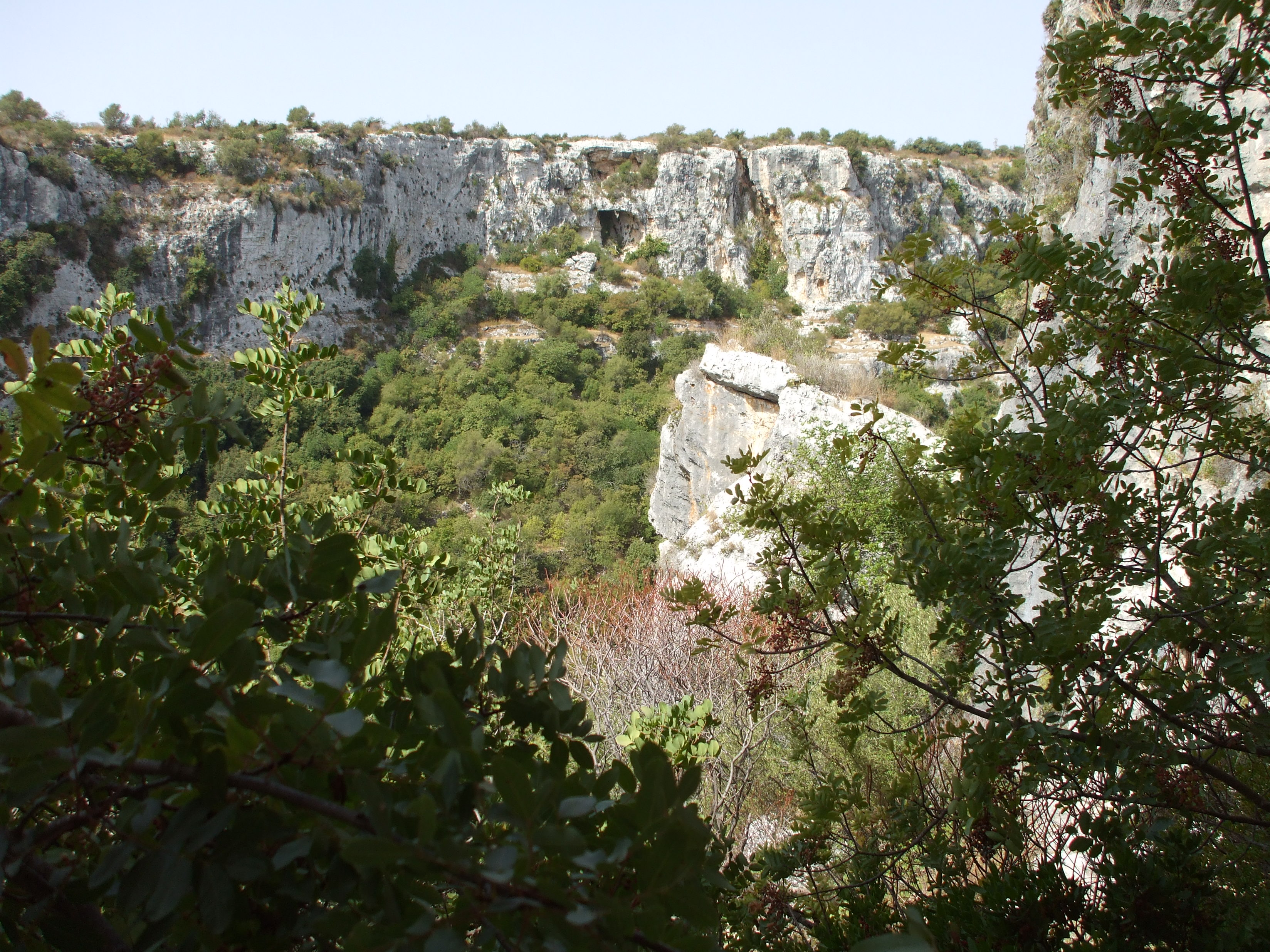 vista cava Ispica da grotta S.Ilarione